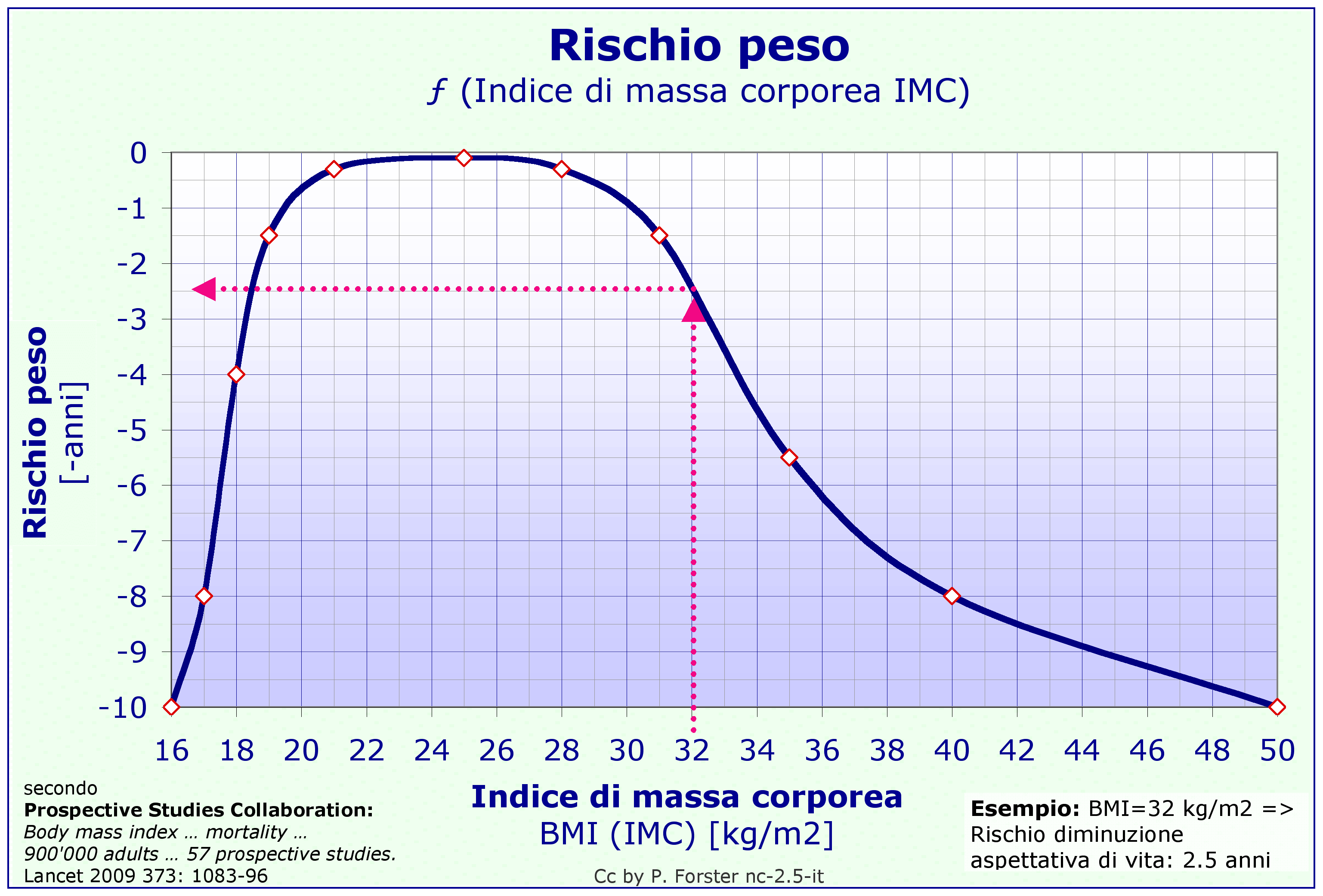 biometria, epidemiologia, rischio, peso corporeo umano, mortalità, indice di massa corporea, IMC, body mass index, BMI, prospective studies collaboration